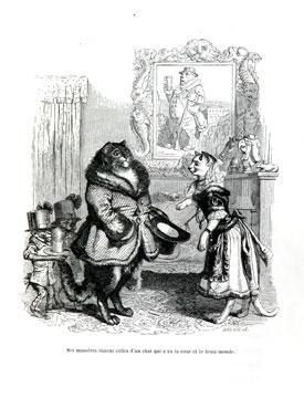 Grandvillova ilustrace ke knize P. J. Stahla